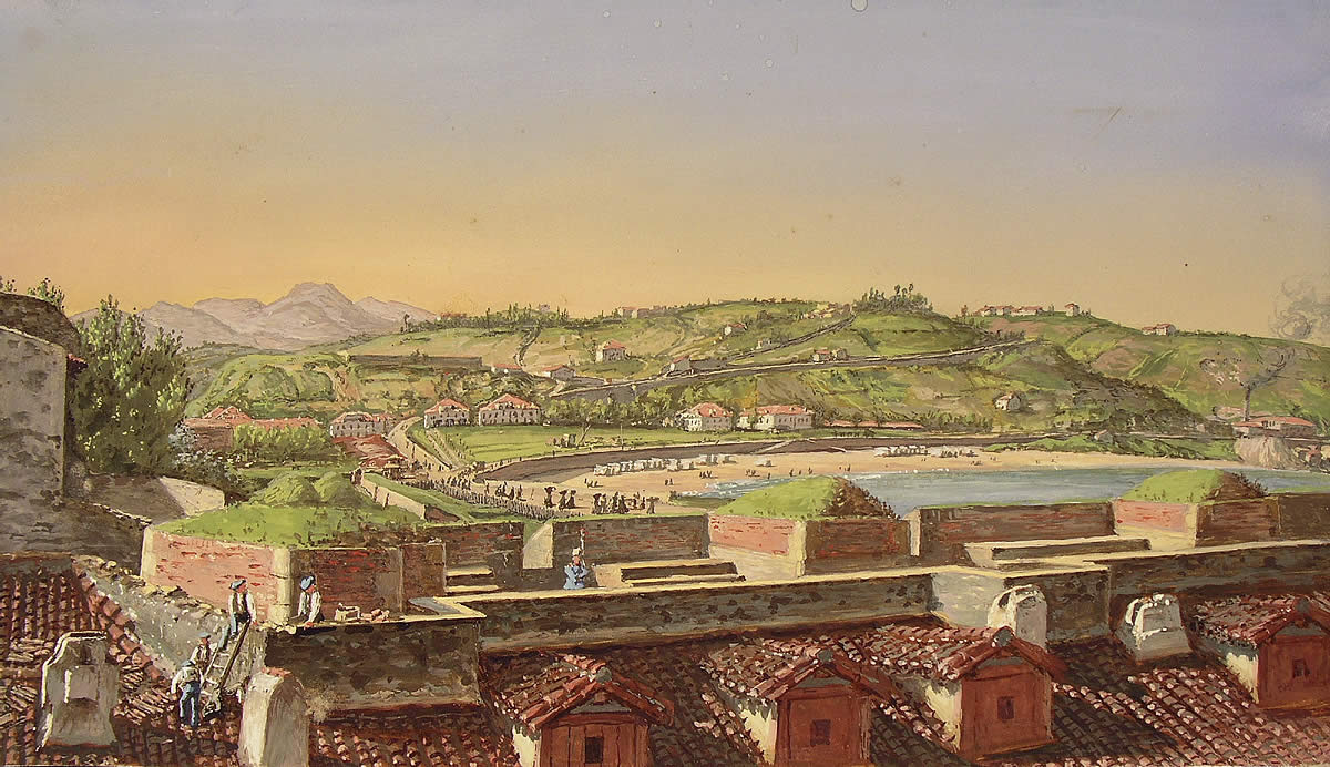 Donostia - San Sebastian